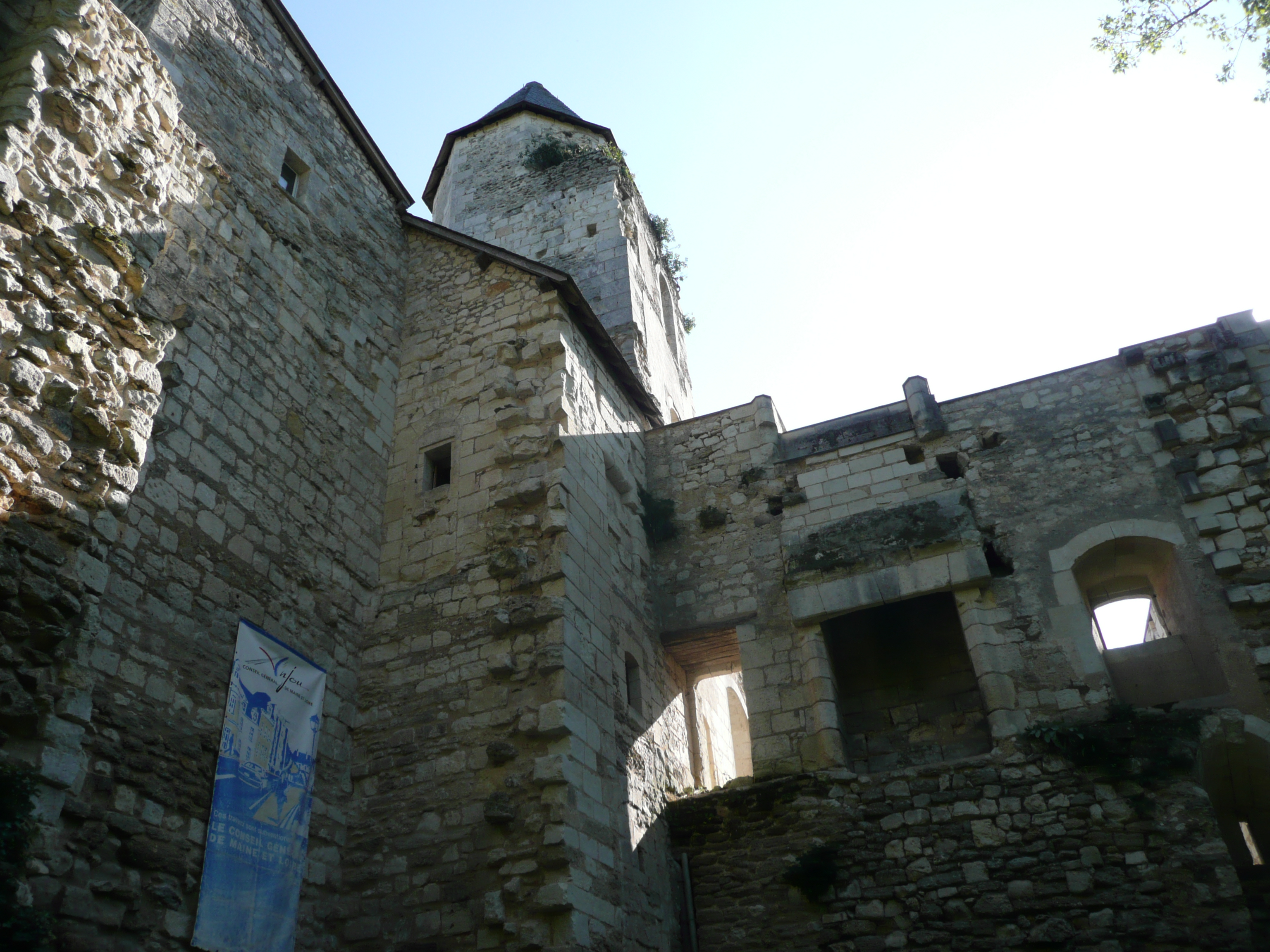 Ambillou-Château - Chateau This building is en partie classé, en partie inscrit au titre des Monuments Historiques. .